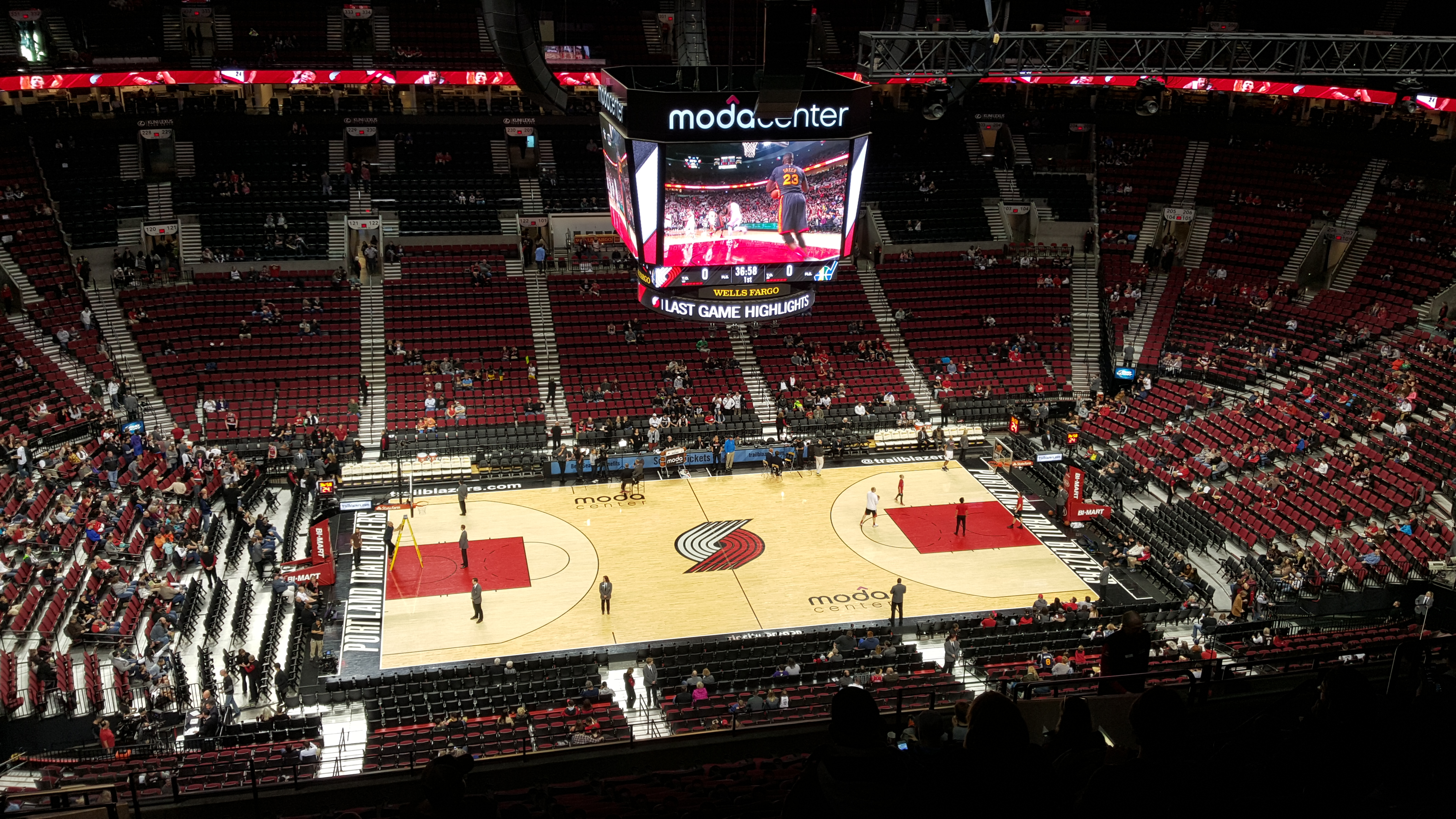 Moda Center before game